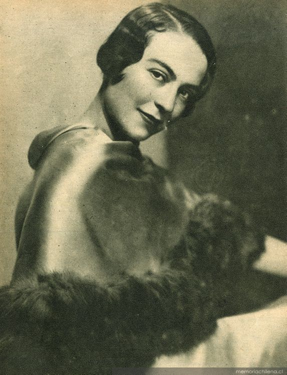 Foto de la joven Loreto Morandé Campino, realizada por el fotografo Jorge Opazo Galindo.